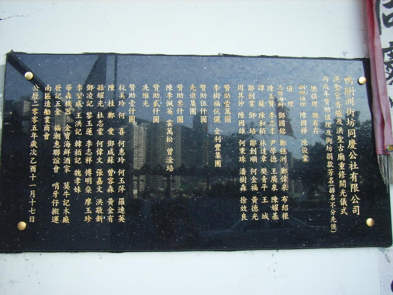 鴨脷洲洪聖廟